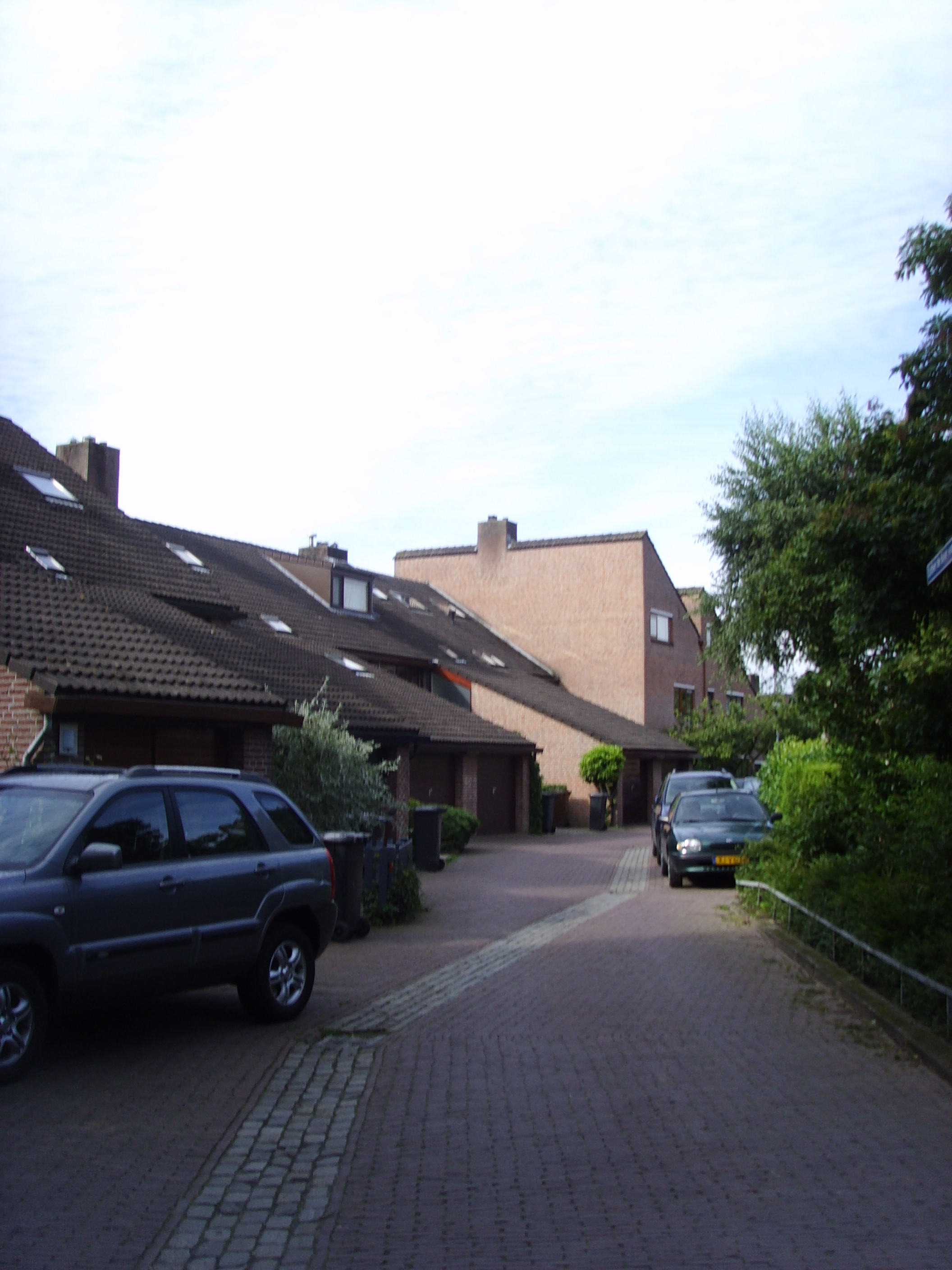 De 'Esther de Boer-van Rijklaan' in de Utrechtse wijk Rijnsweerd